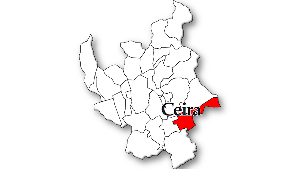 População